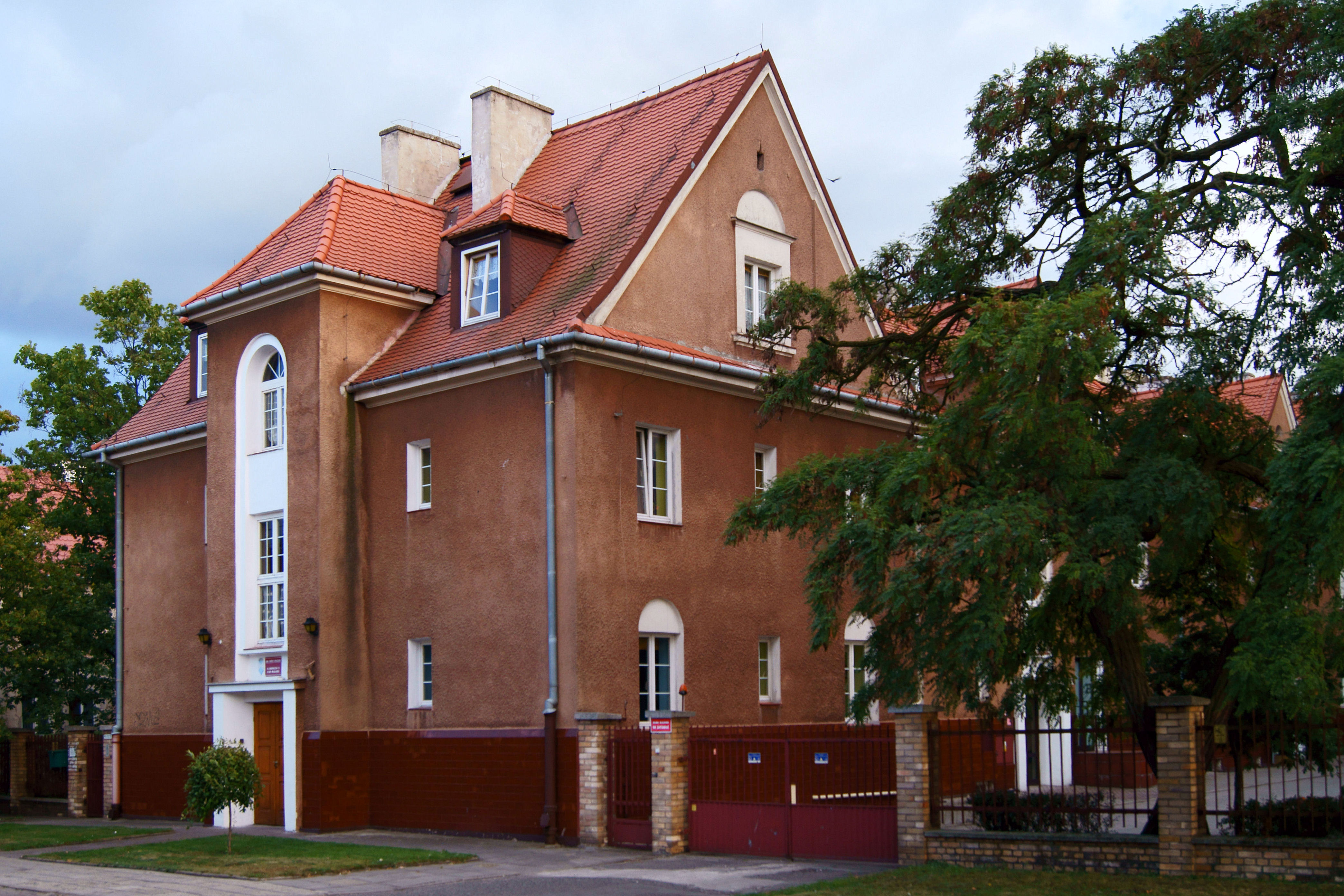 dom, 1922-1925 Włocławek, ul. Nowomiejska 19, miasto Włocławek